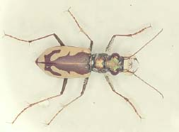 Cicindela theatina - Sandlaufkäfer aus den USA